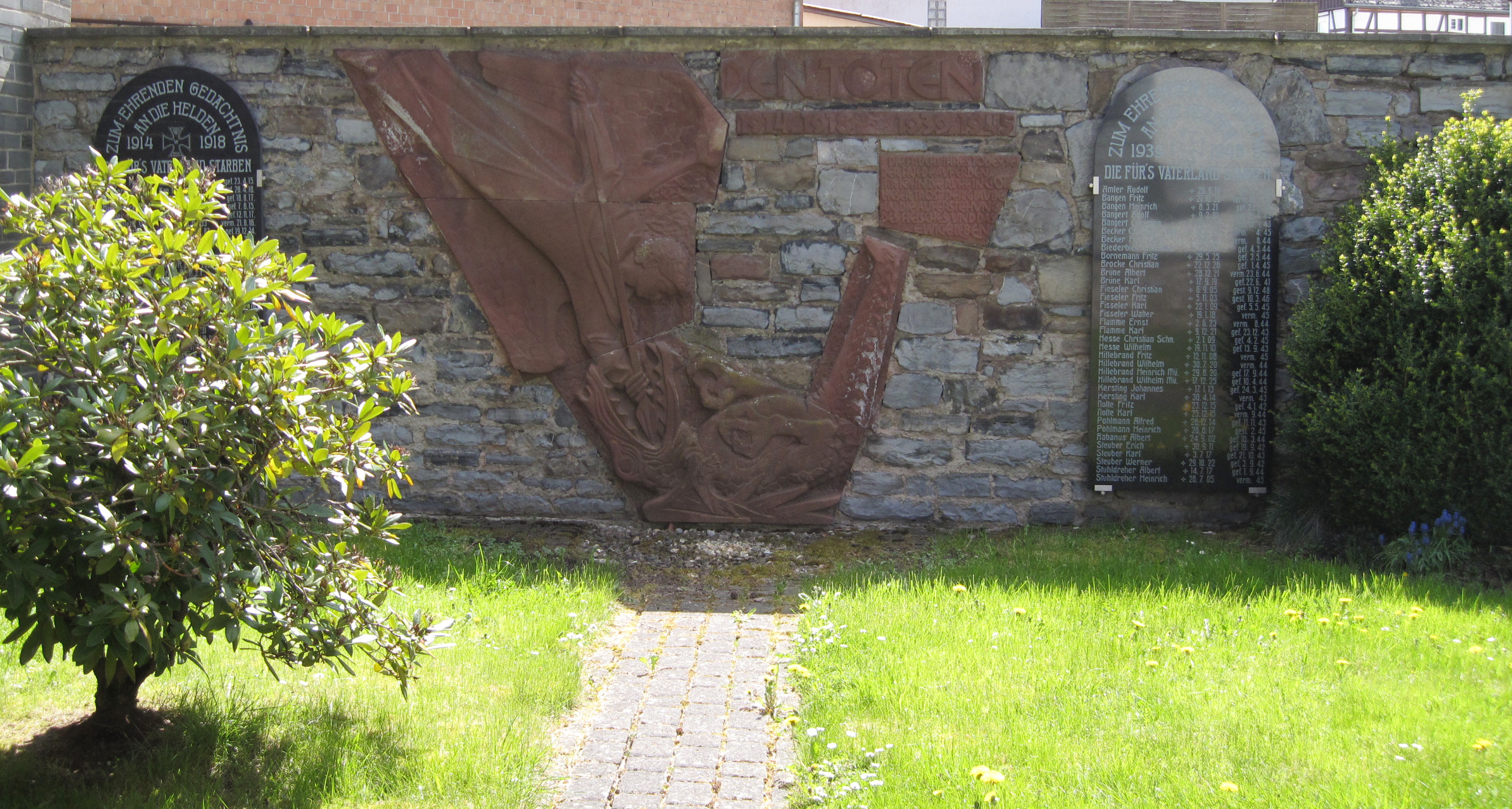 Kirche, Stormbruch, Kriegerdenkmal, Gemeinde Diemelsee, Hessen, Deutschland